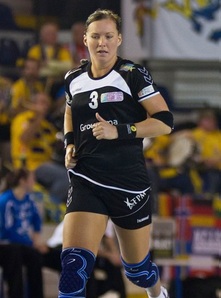 Tina Flognman Toulon st Cyr